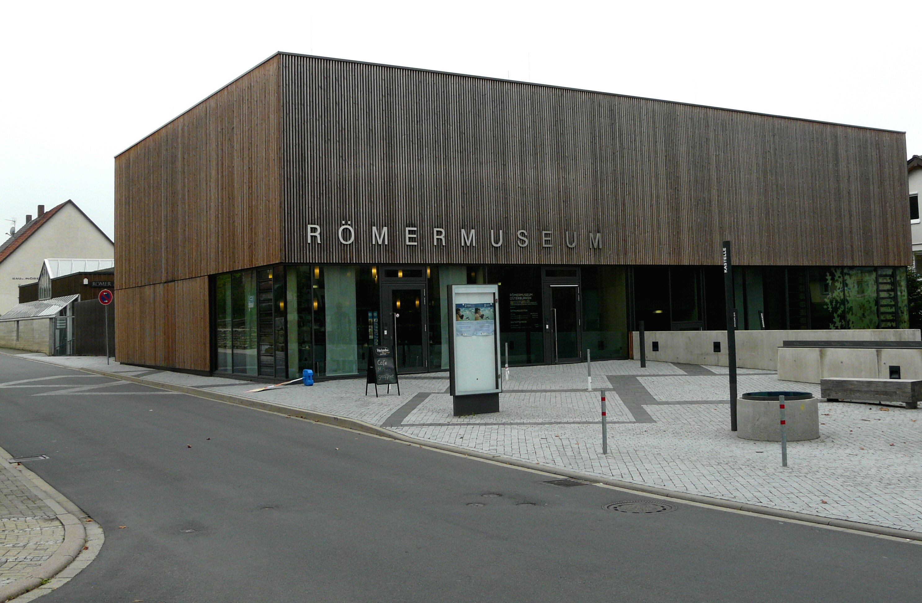 Römermuseum, überregionales Informationszentrum am UNESCO-Welterbe, Zweigmuseum des Archäologischen Landesmuseums Baden-Württemberg